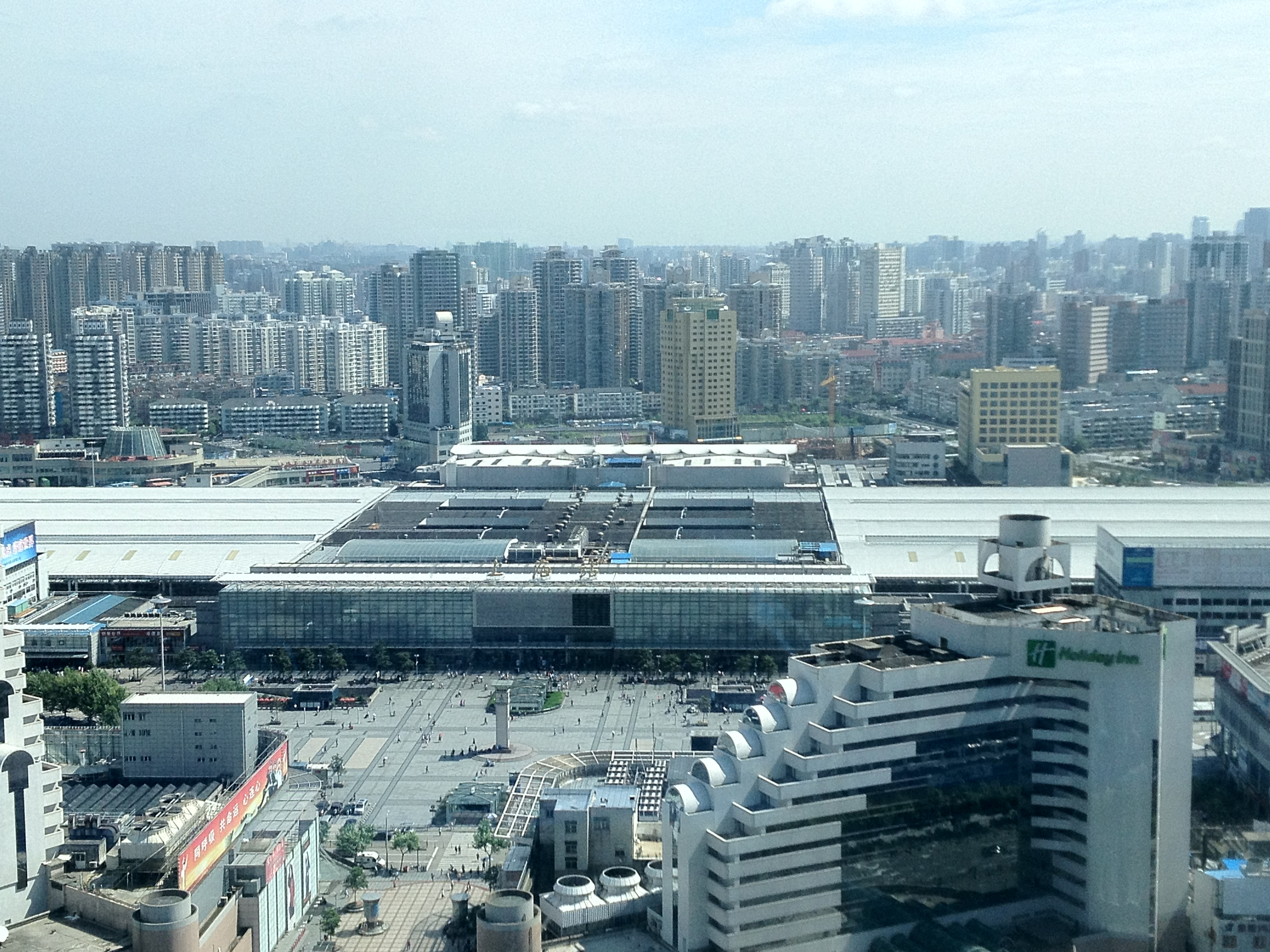 上海火车站南广场